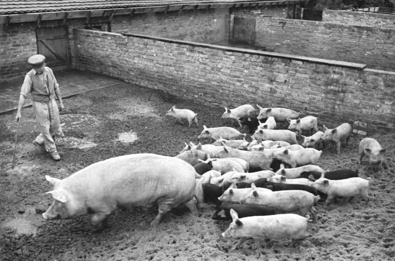 Illus-Biscan Leu-Ho. 25.8.1951 Schweinemästerei der Maschinenfabrik Buckau-Wolf in Magdeburg auf dem Werksgelände in Salbke. Der Leiter der Werkküche der Maschinenfabrik Buckau-Wolf in Magdeburg hat auf dem Werksgelände in Salbke eine Schweinemästerei angelegt. Mit 380 Tieren ist diese industrielle Schweinezucht die grösste in Sachsen-Anhalt. Die Schweinemästerei von Buckau-Wolf beschränkt sich aber nicht nur darauf, die Zuteilungen für die Werkküche aufzubessern, sondern beliefert auch die VVEAB und hat auch Schweinemastverträge abgeschlossen.- UBz, Das Sechs-Zentner-Schwein (Garbo) ist der Stolz des Schweinemeisters Otto Schulz